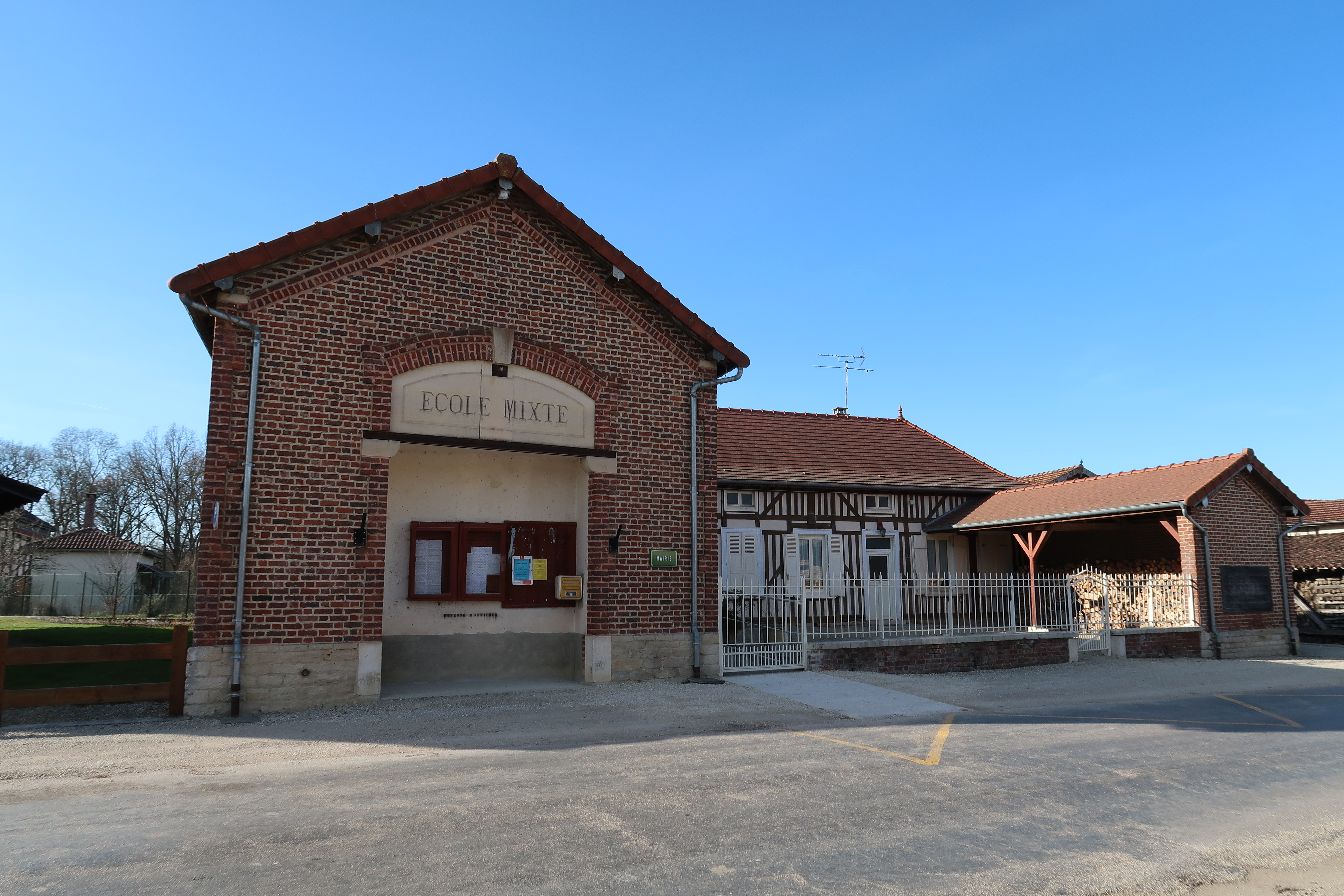 Bailly-le-Franc, mairie